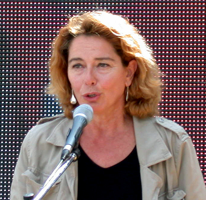 Monica Guerritore Licenza =